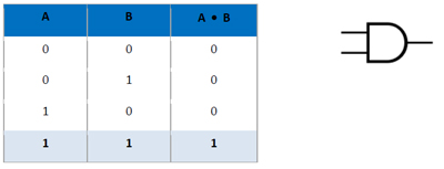 Tablica istinitosti i oznaka za konjunkciju.